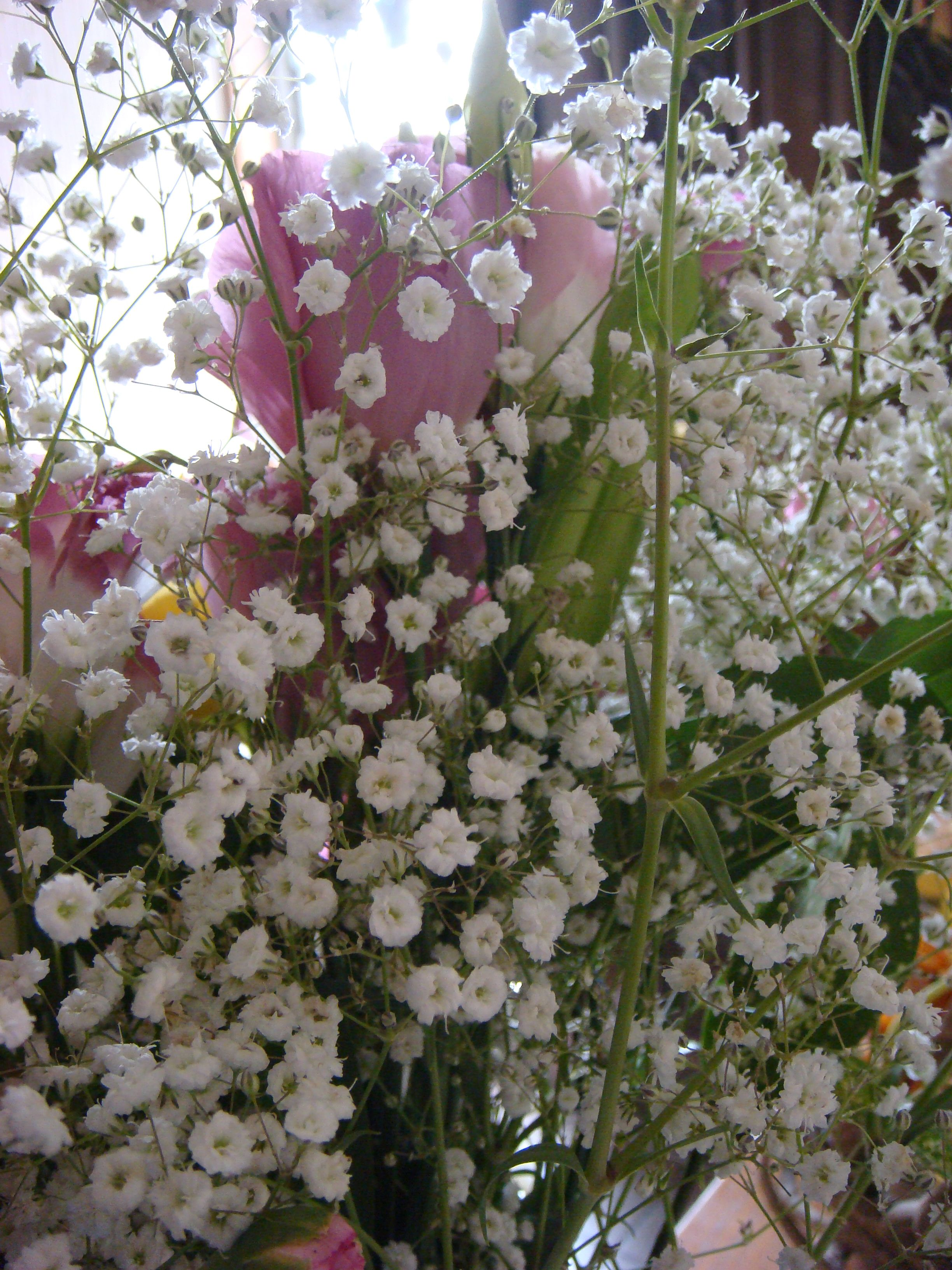 カスミソウ。(2007/05/23 Takarazuka, Hyogo, JAPAN)